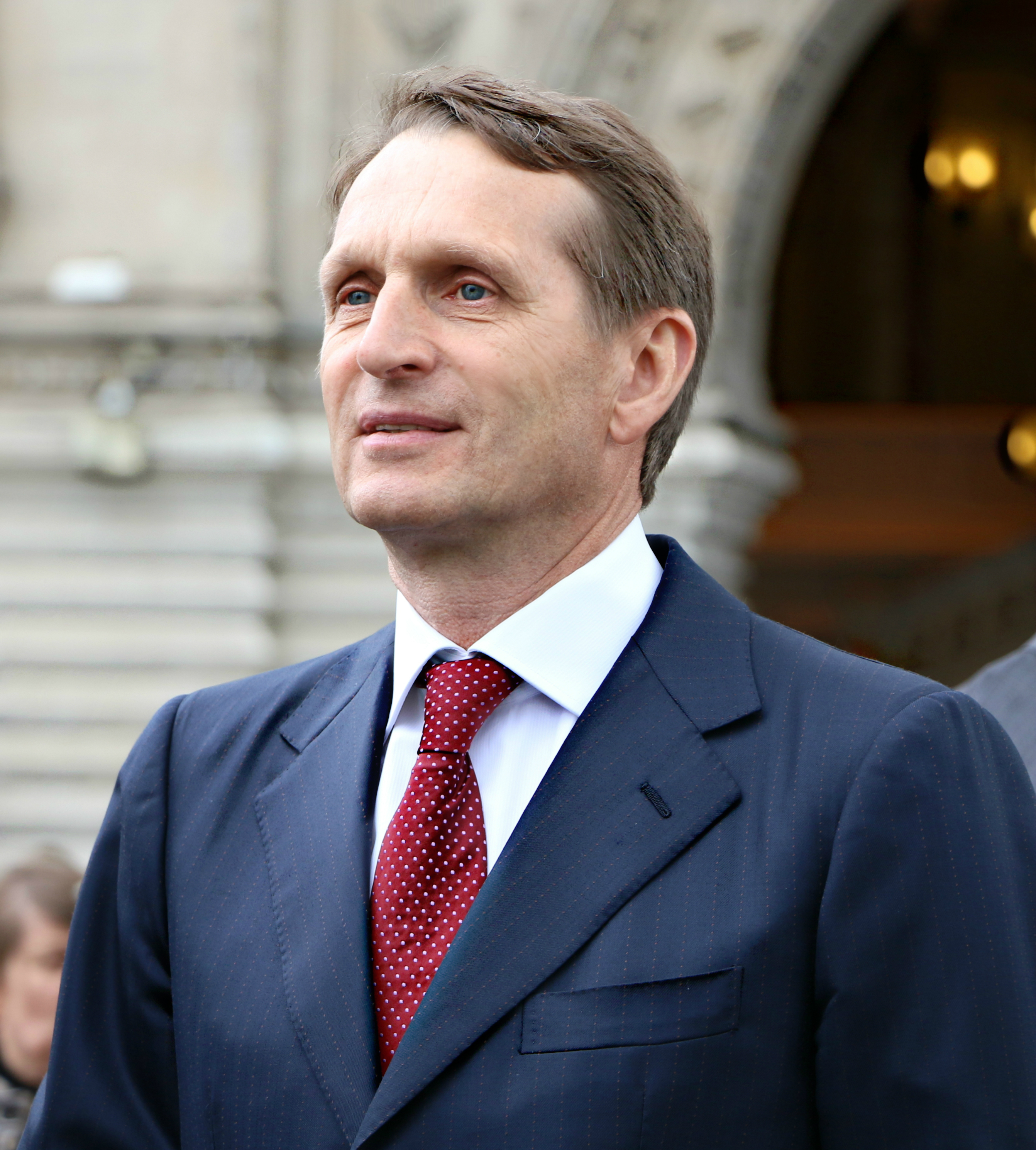 Нарышкин Сергей Евгеньевич - председатель Государственной Думы.